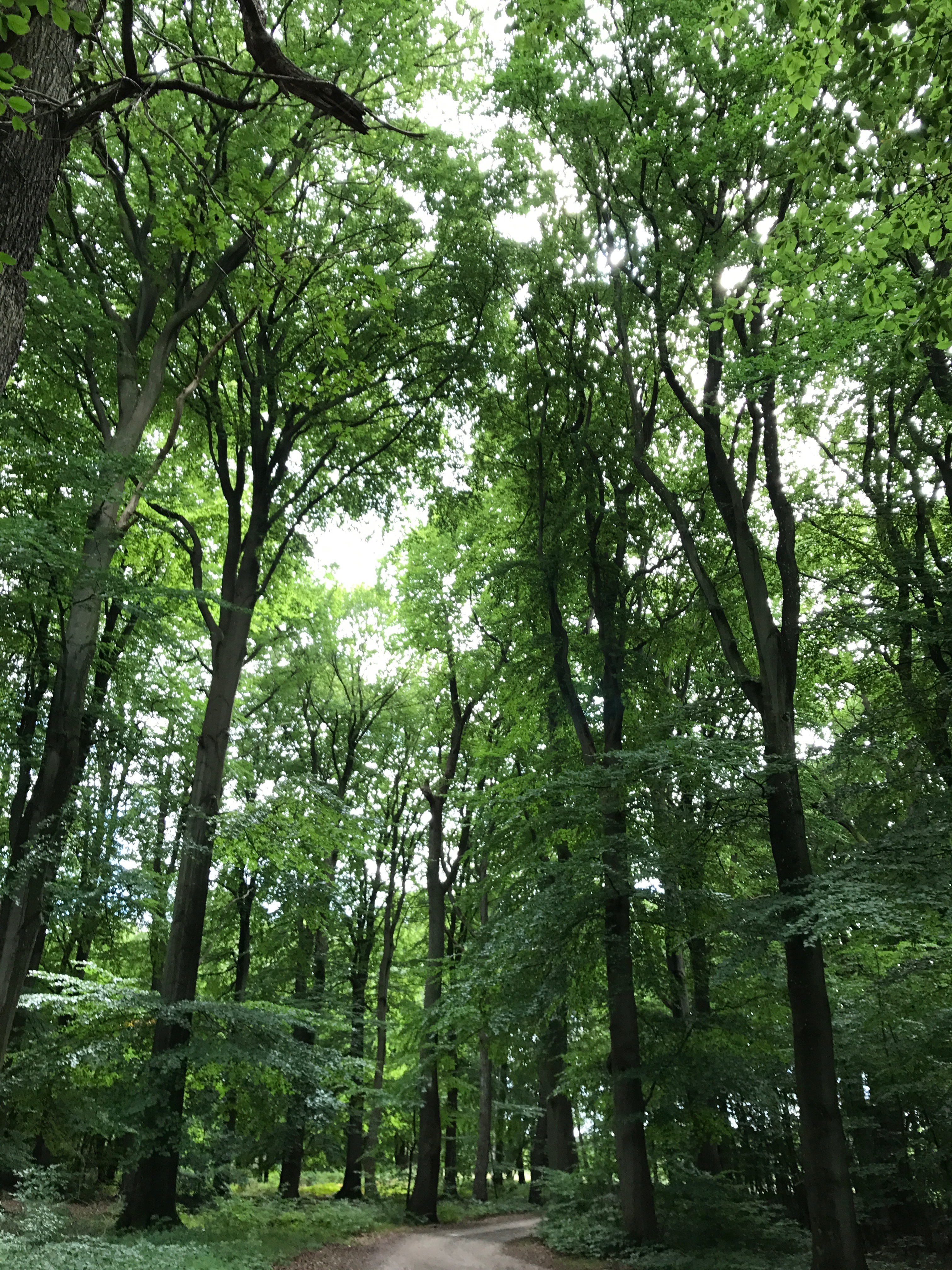 Fjeld Skov Sommer 2017